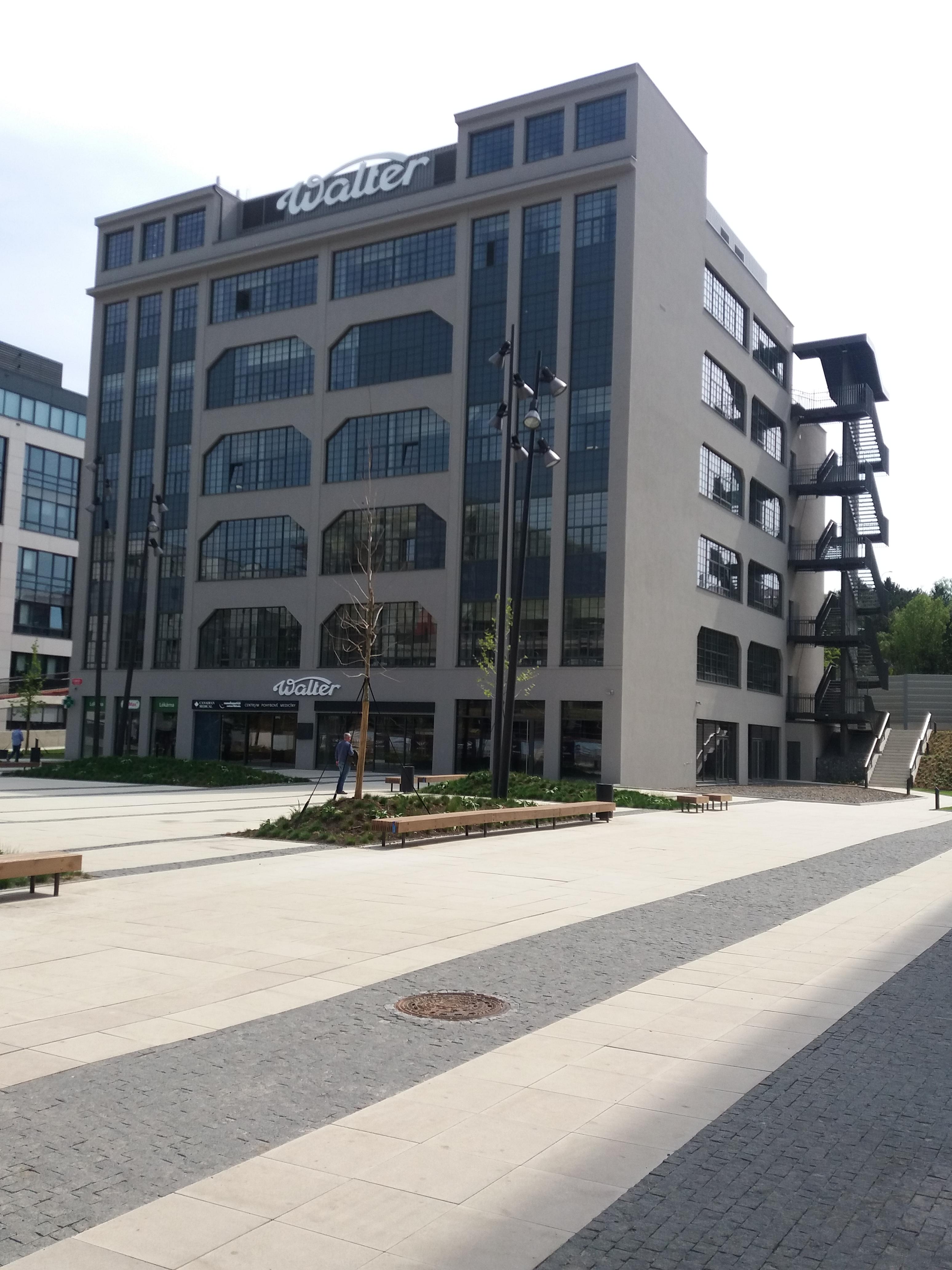 Jediná budova z původní továrny Walter dnes (bývalý "betoňák"), Walterovo náměstí 329/2.